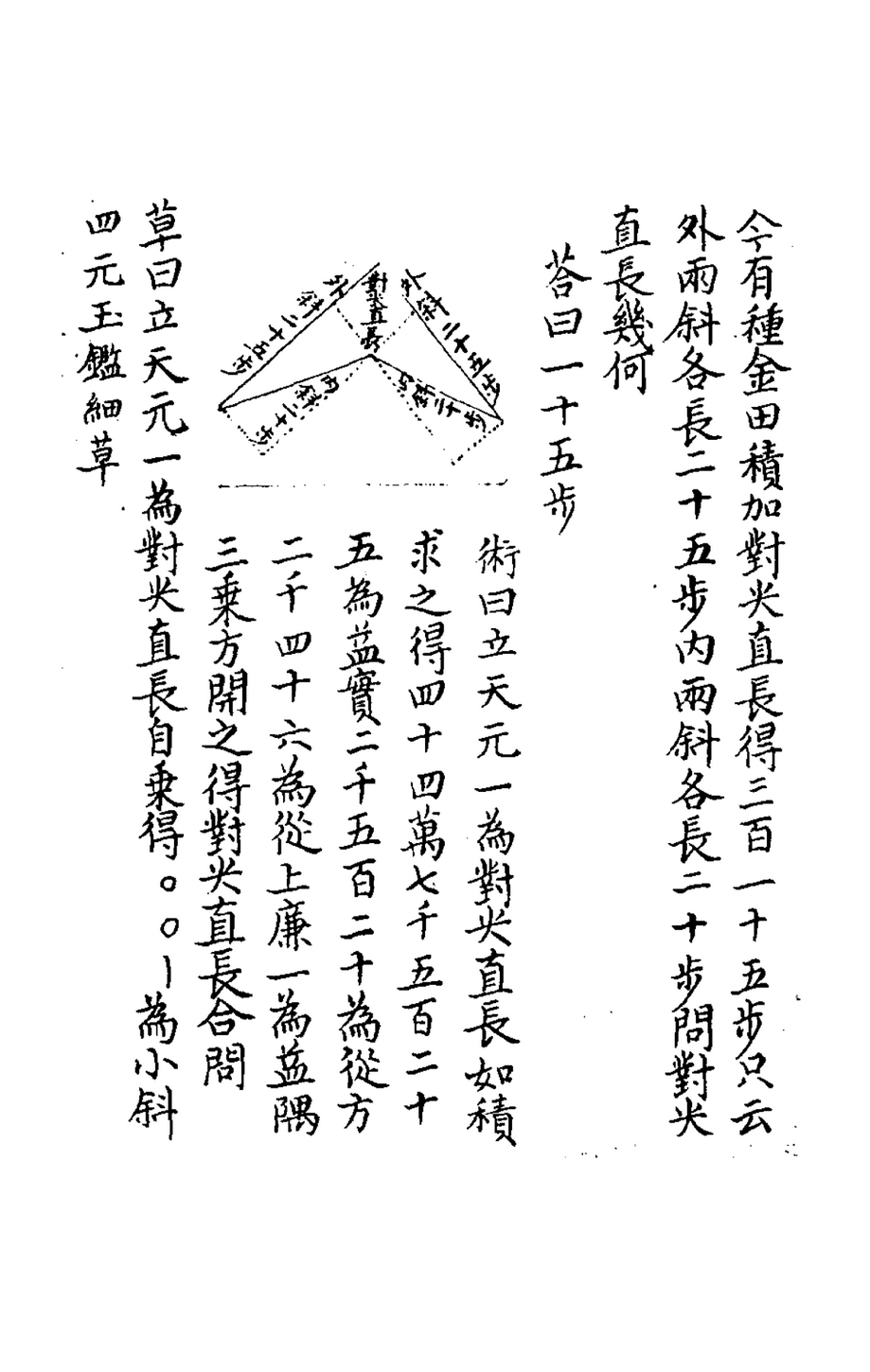 四元玉鉴拨换截田